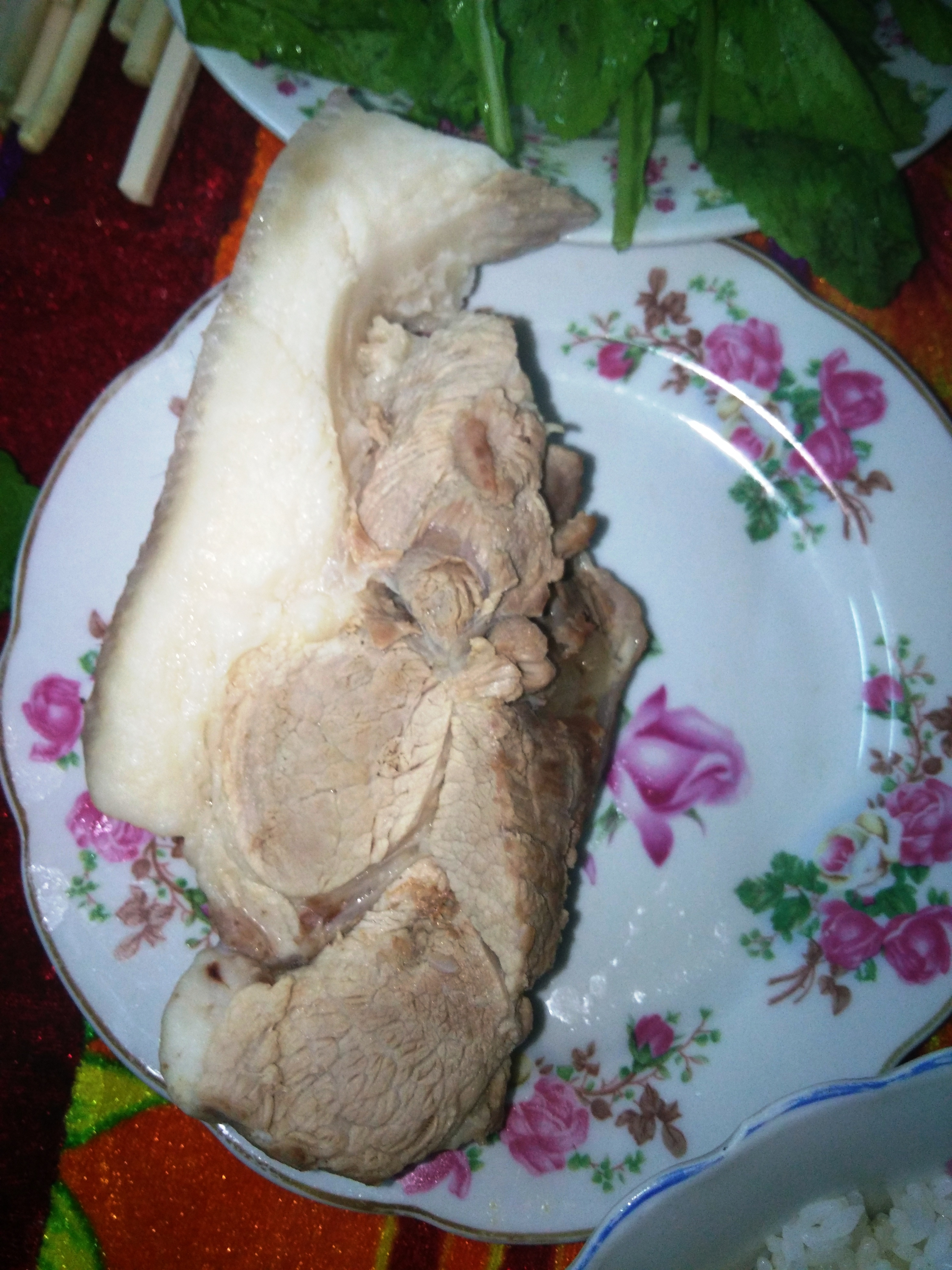 Miếng thịt heo luộc để cúng ở Phường 1 Đông Hà